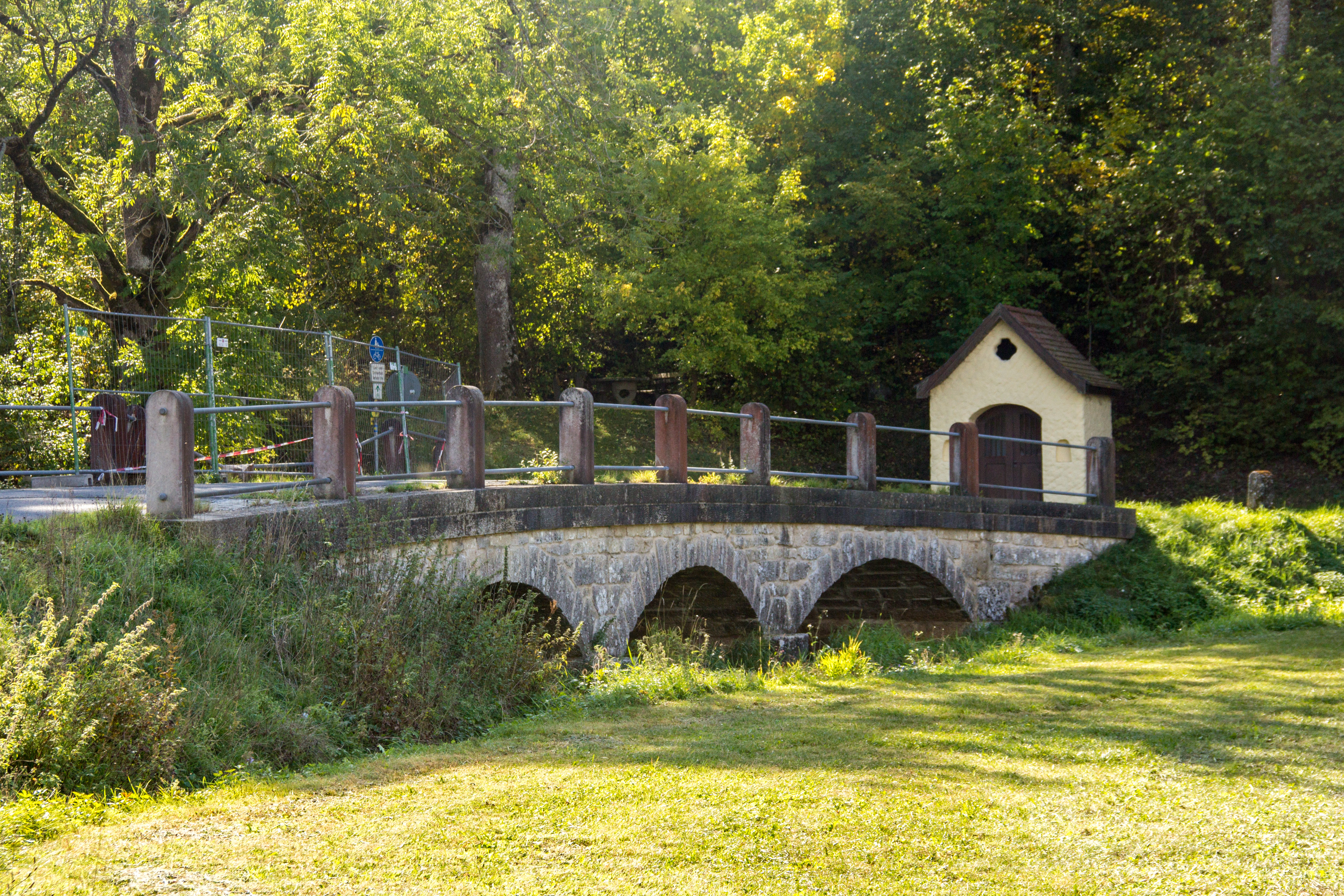 Brücke, über die Anlauter, dreibogig, in Sandstein und Kalkplatten-Schichtmauerwerk, Mitte 19. Jahrhundert; südlich des Ortes.